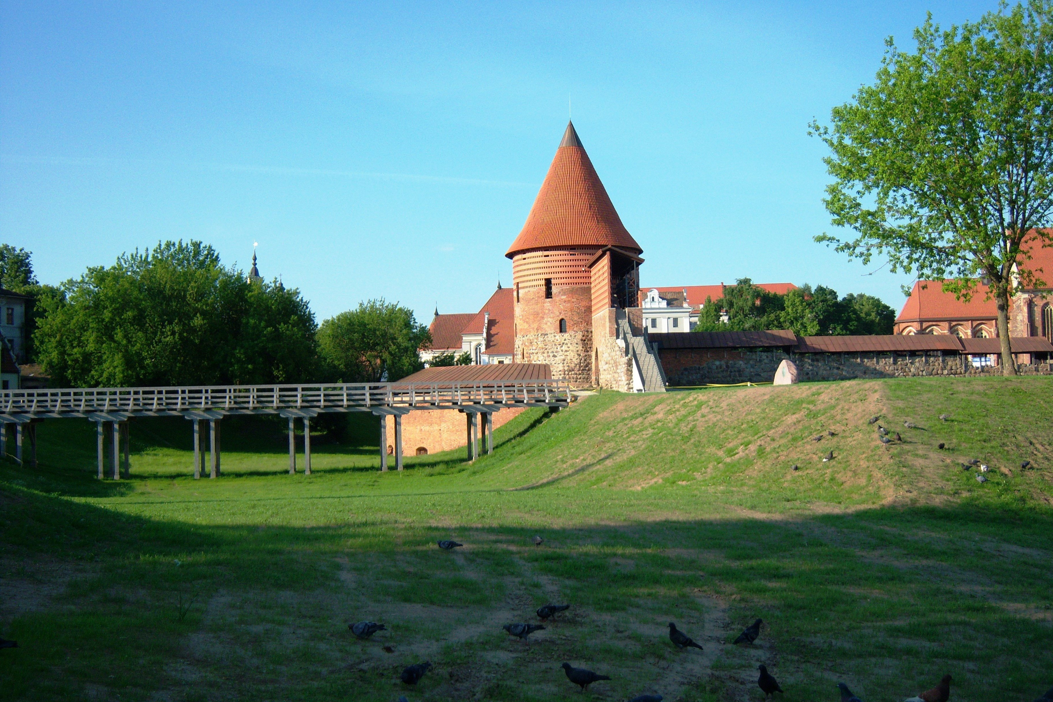 Kaunas Castle Kategorija: Kaunas castle